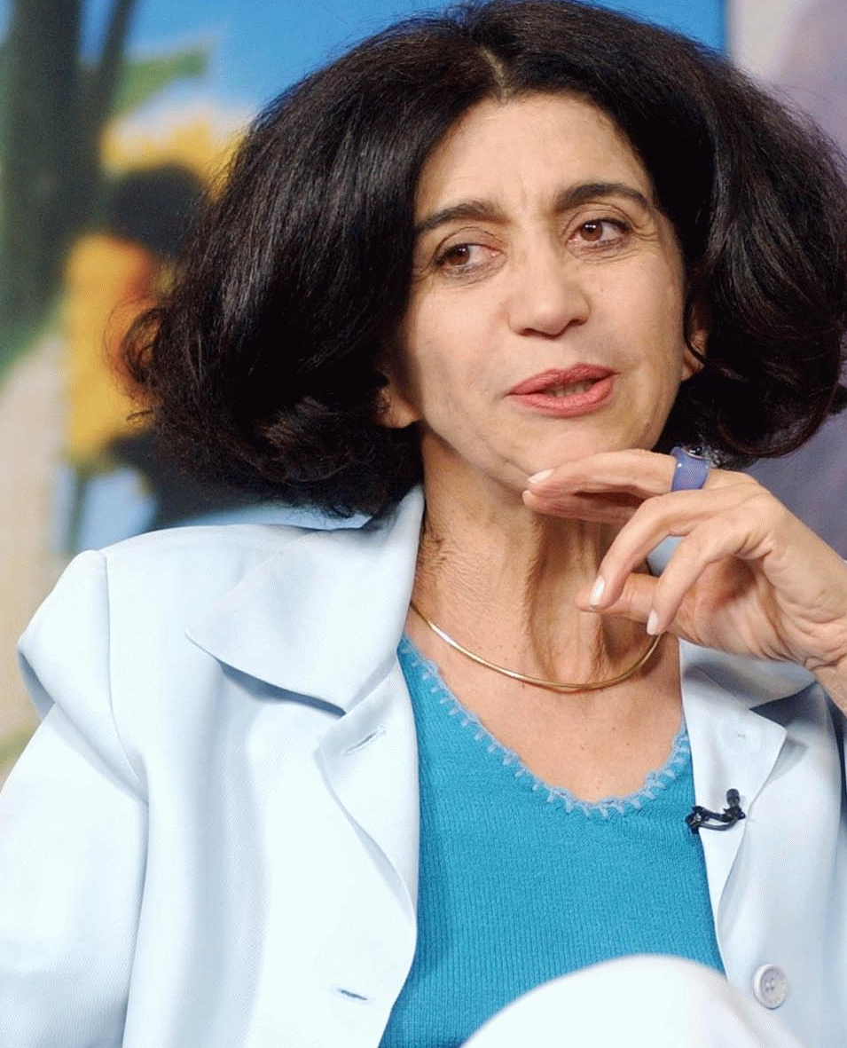 A jornalista e escritora Dad Squarisi fala de seu novo livro "Mais dicas da Dad"